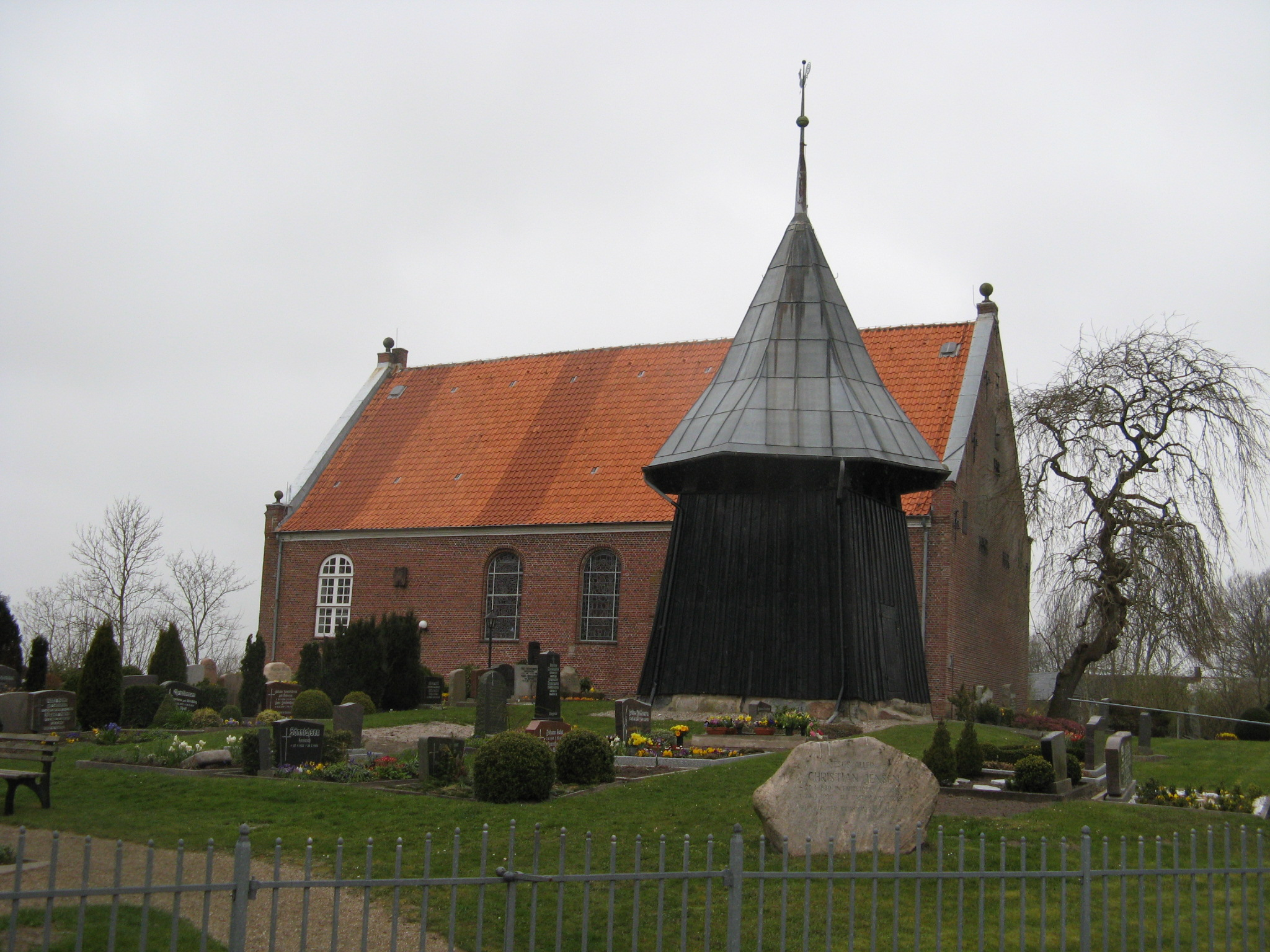 Church in Fahretoft. Author: Dirk Ingo Franke